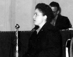 Maria Pasquinelli, attivista italiana, durante il processo per l'uccisione del generale Robert de Winton